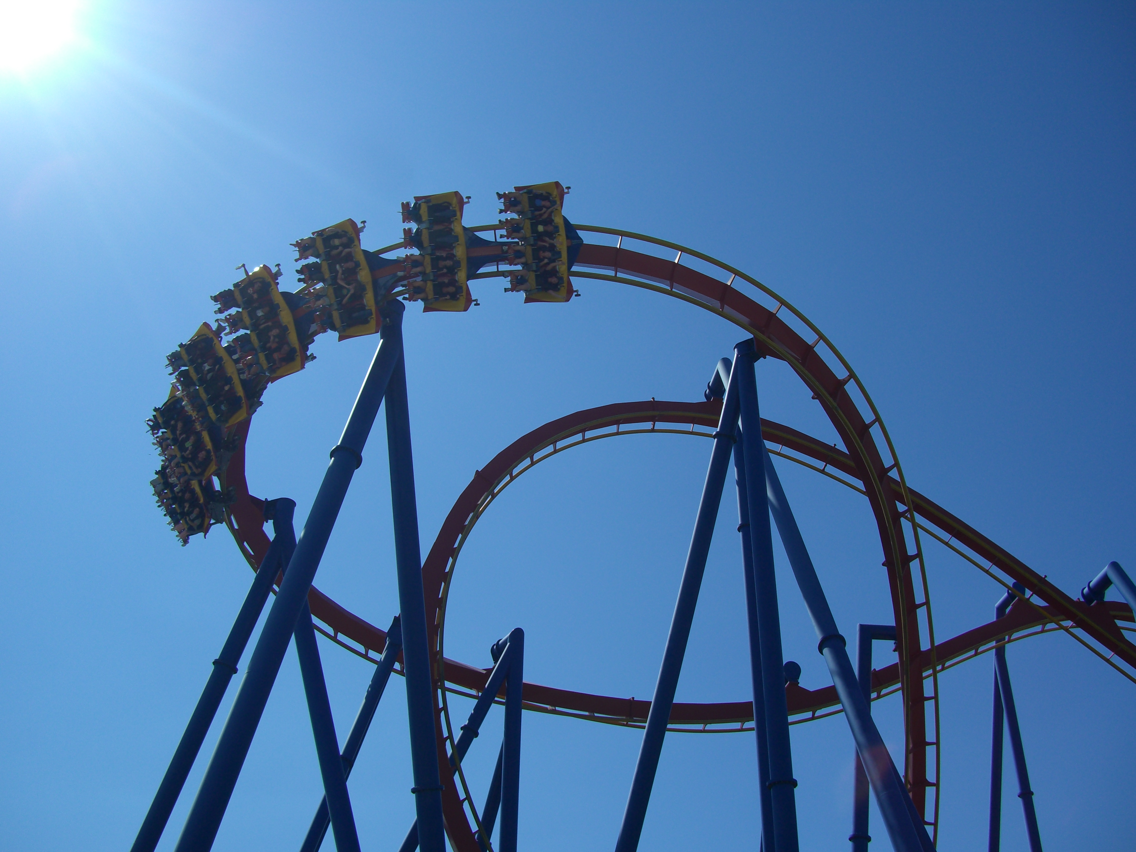 Superman - Ultimate Flight , montagnes russes à Six Flags Over Georgia